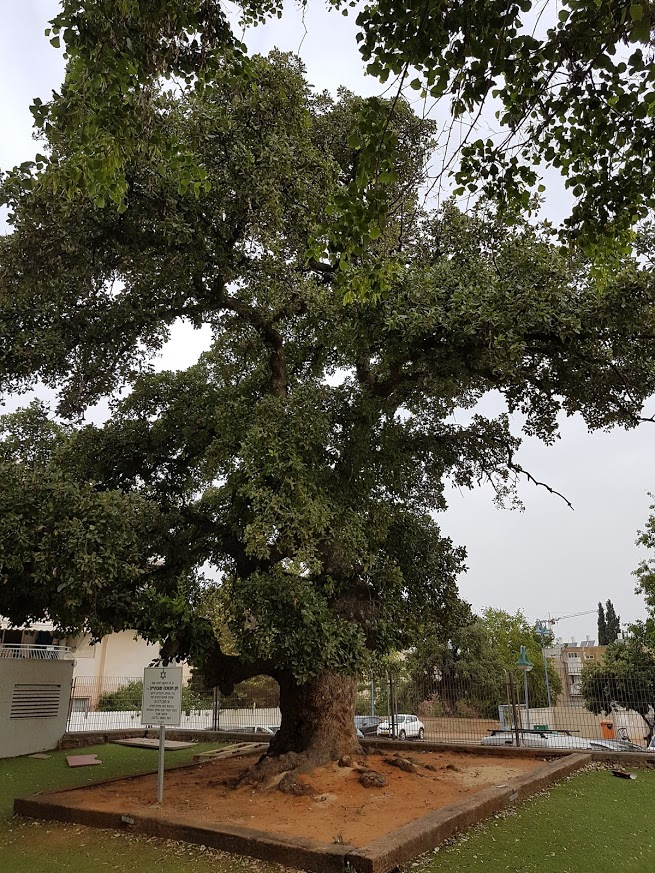 עץ אלון תבור בגן ציבורי בפרדס חנה מתוך מיפוי אלוני ישראל על שם מיכאל אבישי